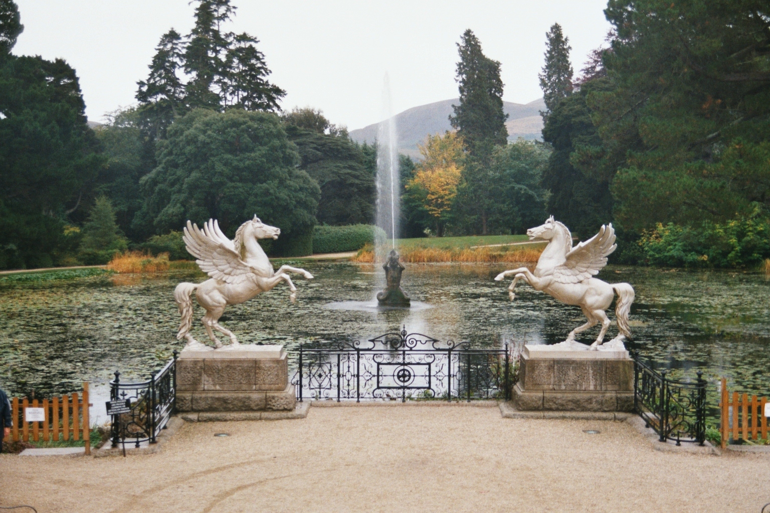 Powerscourt Teich, Irland Source: eigenes Foto